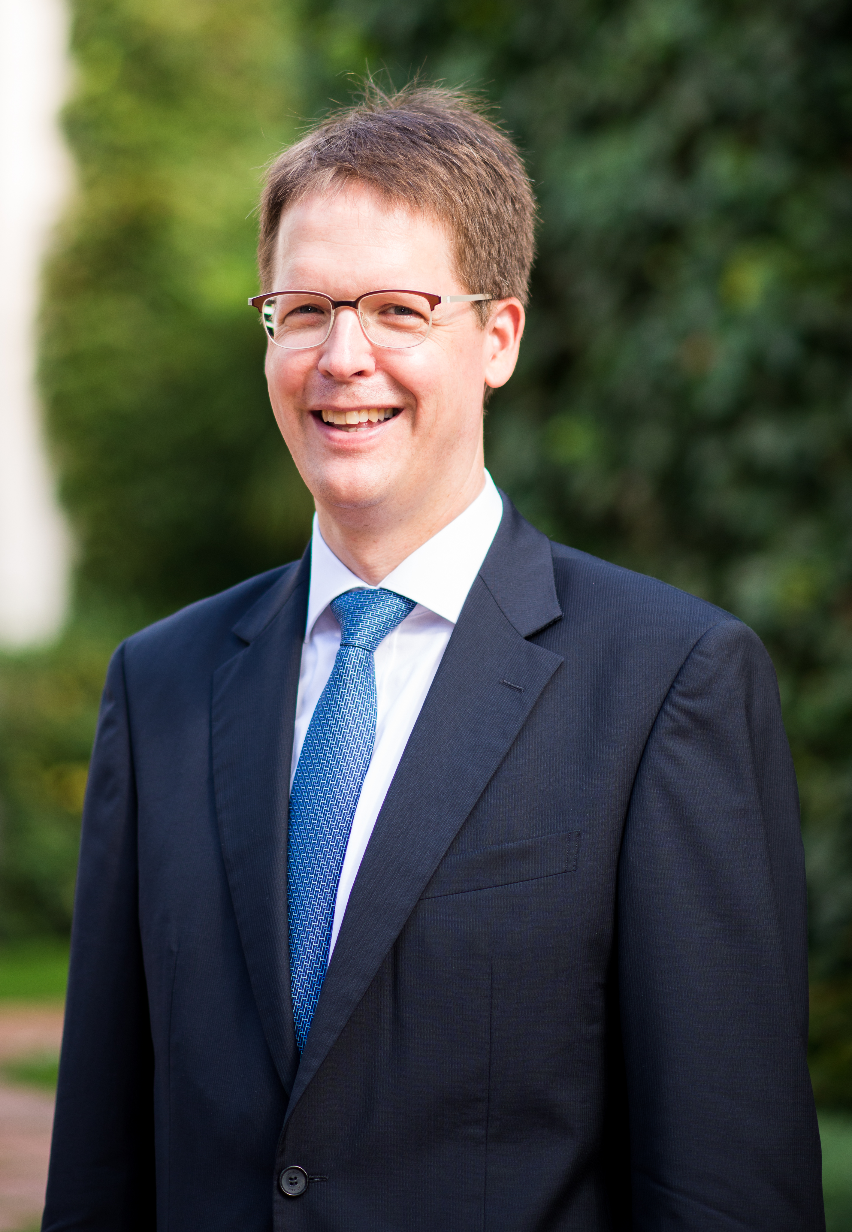 Franz Heukamp, profesor de Análisis de decisiones, director general del IESE Business School.